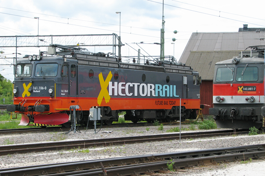 Hr 161.106.0 at Hallsberg, Sweden